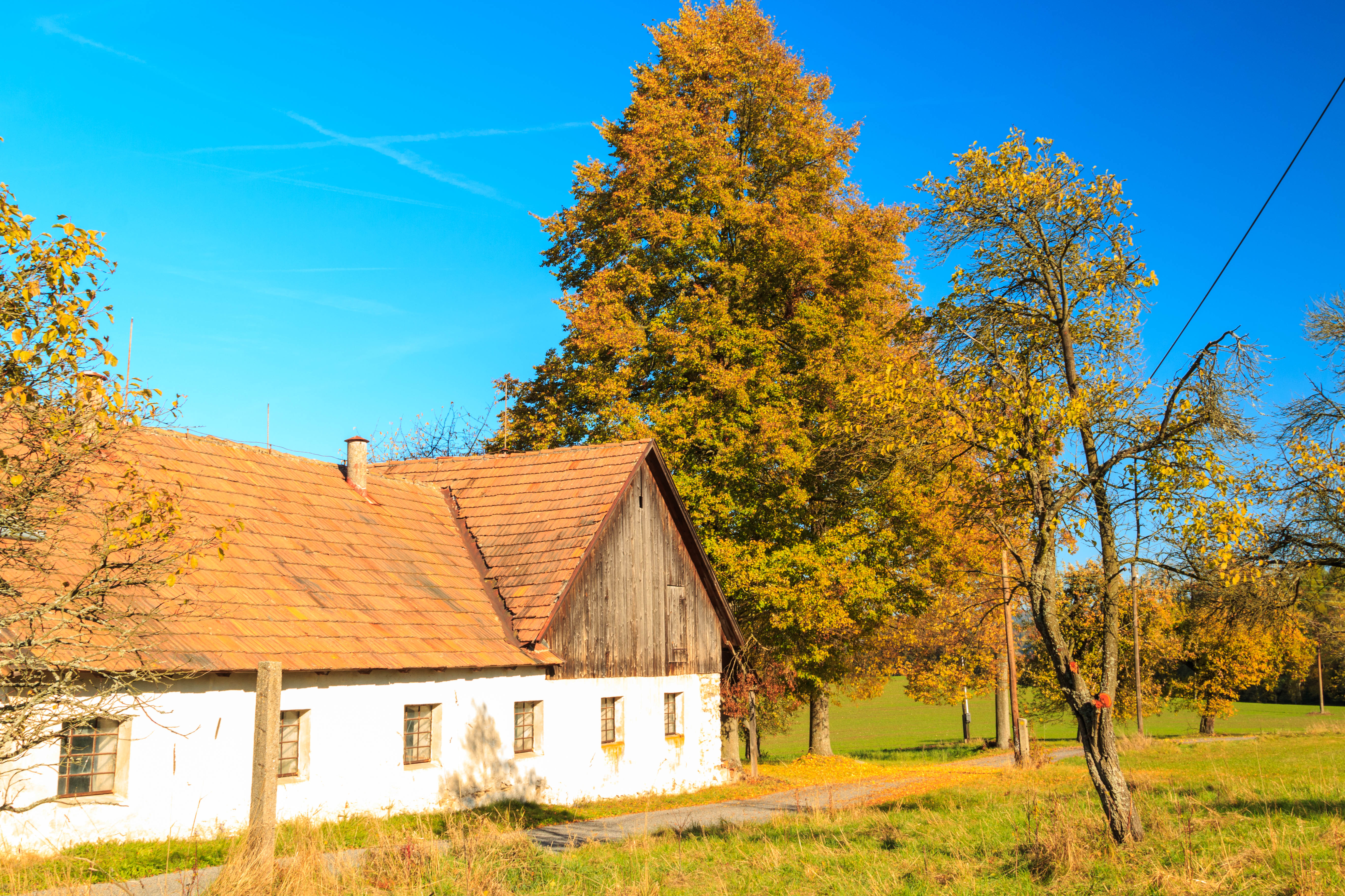 Horní Sokolovec č. 7